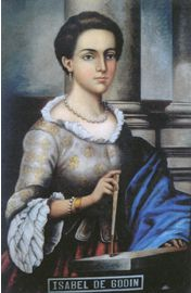 Portrait d'Isabel de Godin, antérieur à 1798